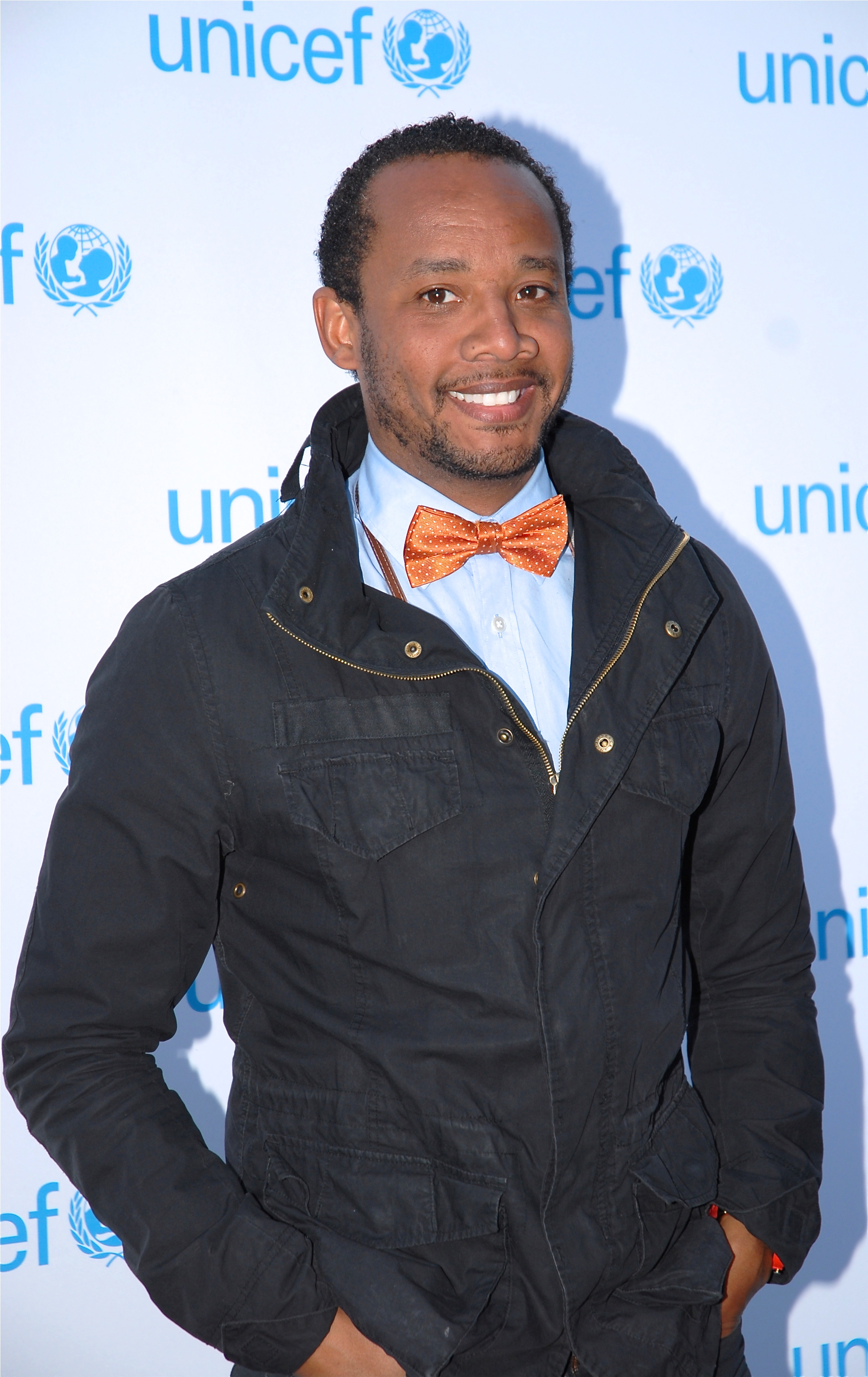 Putte Nelsson på Unicef-gala i Stockholm den 1 maj 2012.